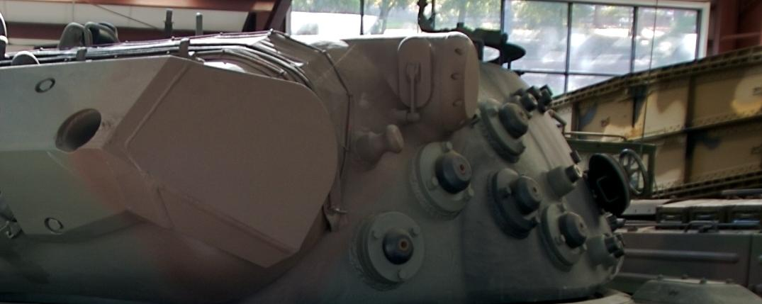 Shock Mounts am Turm eines Leopard 1. An diesen Elementen aus Gummi wurde bei der Kampfwertsteigerung die Zusatzpanzerung angebracht. Die Lagerung war somit schockfrei.